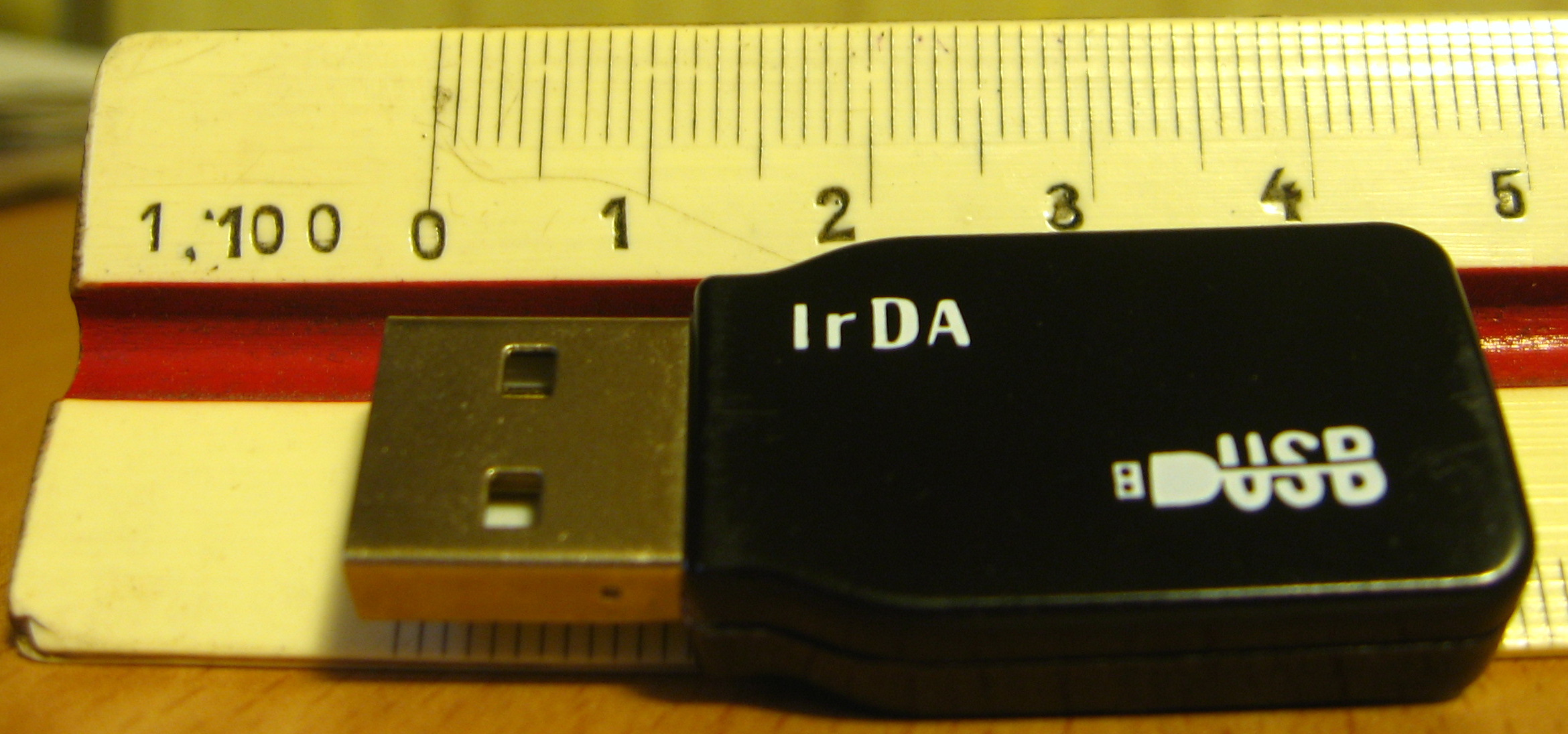 Moduł IrDA na USB do porównania z linijką (w centymetrach)